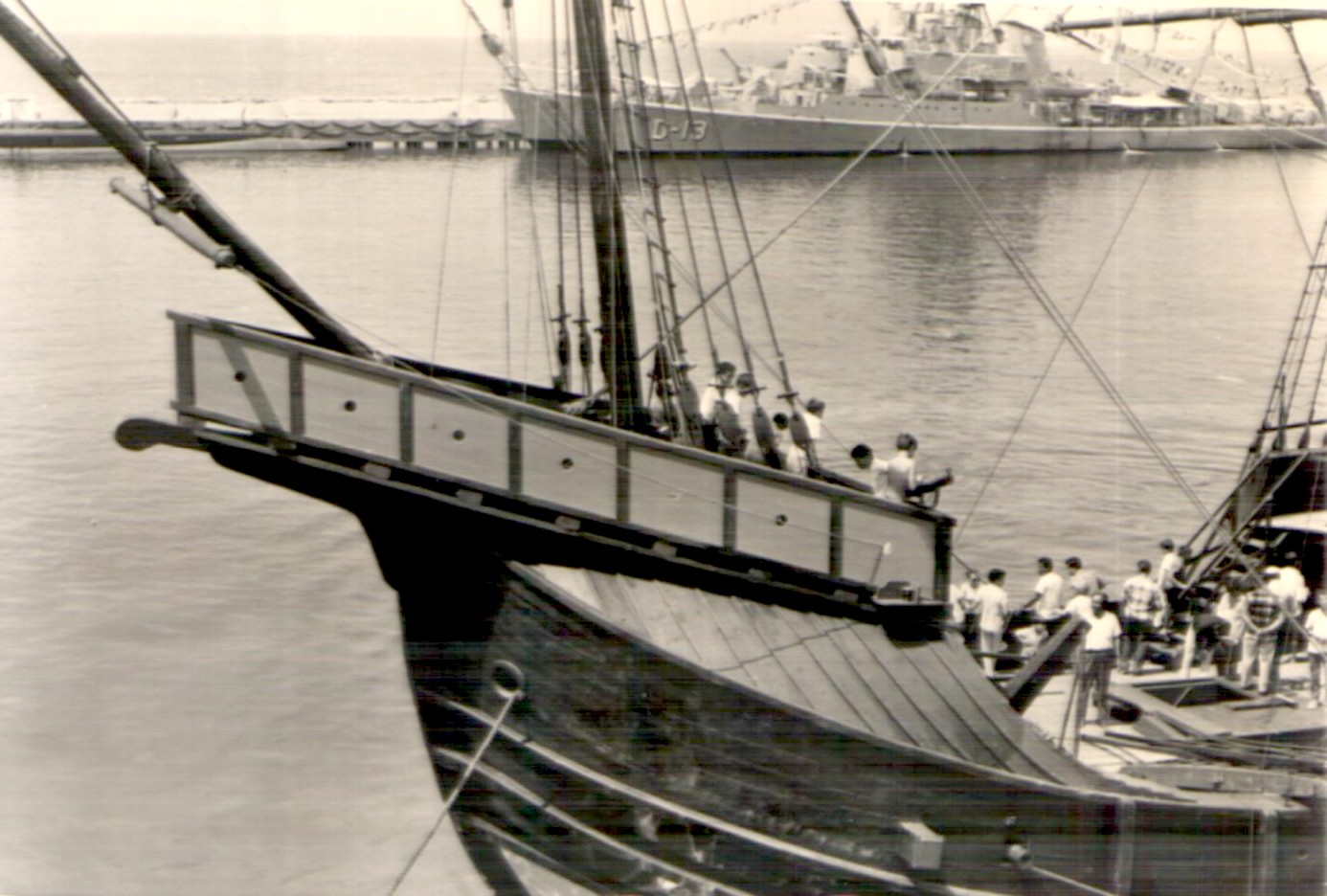 Replica de la Nao Santa María y El destructor Juan José Flores en Puerto Cabello, estado Carabobo - Venezuela 1970